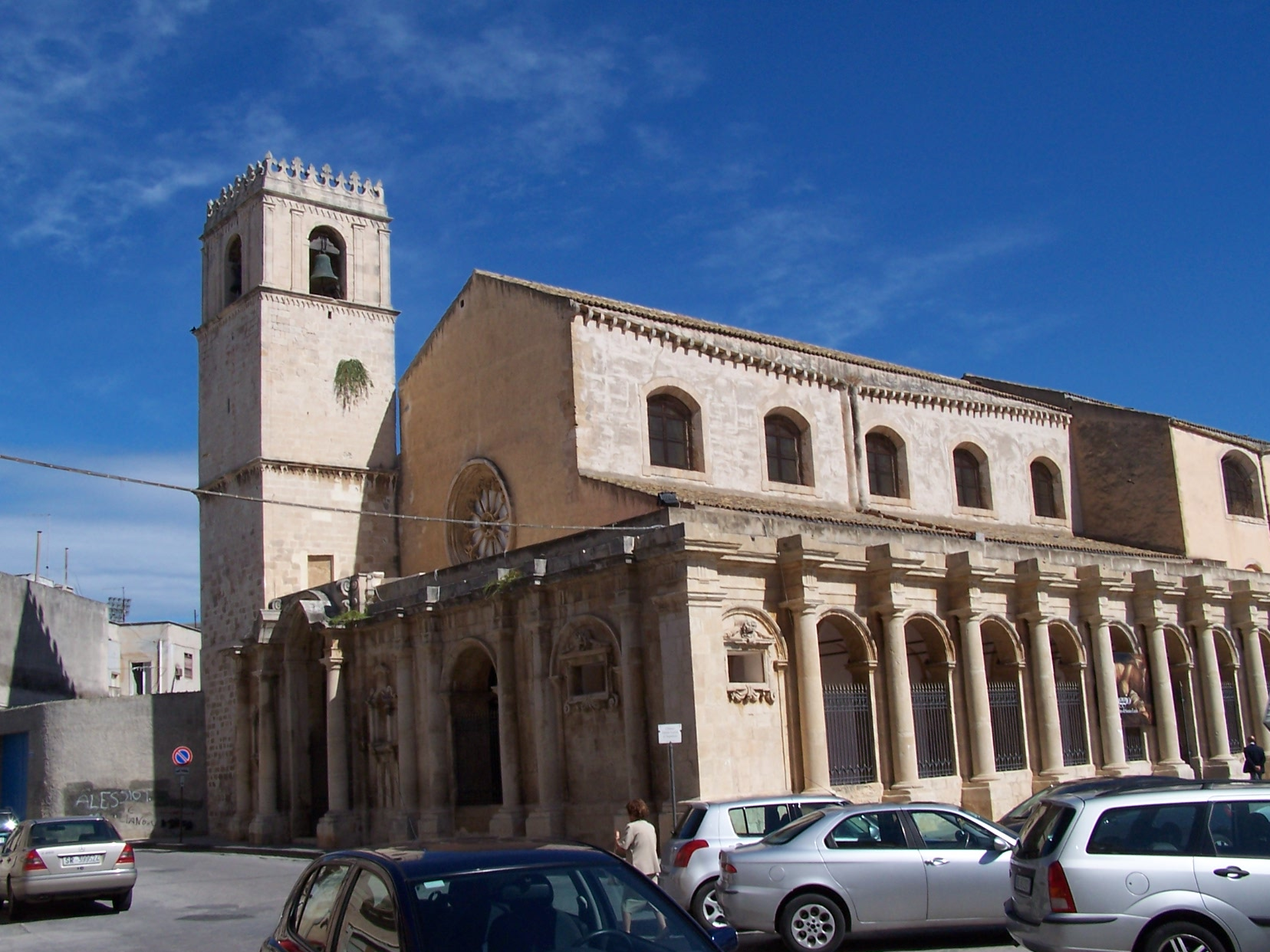 Facciata e fianco della chiesa di Santa Lucia al Sepolcro a Siracusa. Il portico laterale (1734) è attribuito a Pompeo Picherali, ed è stato ricostruito dopo un crollo nel 1970.